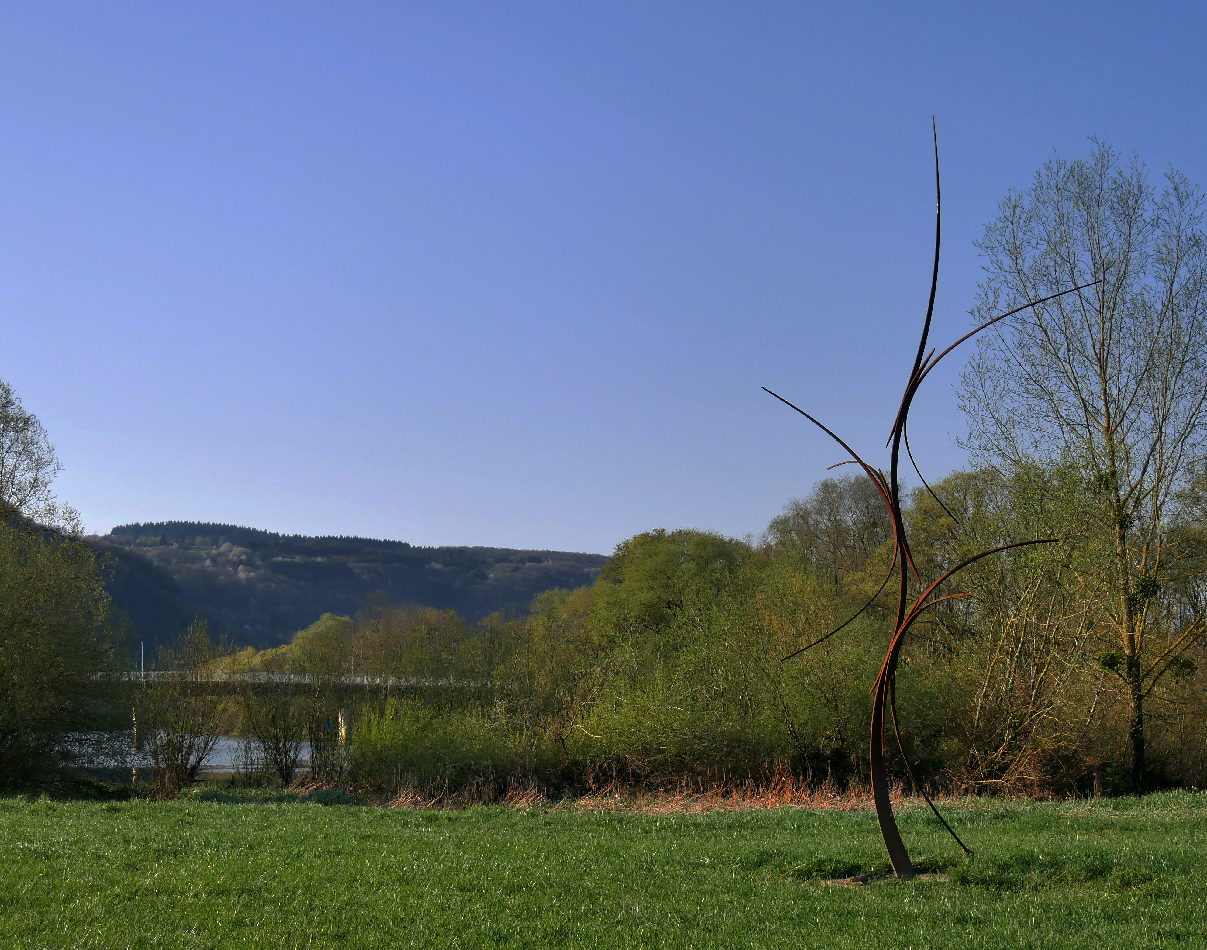 Feuersprung von Sigrún Ólafsdóttir am Ufer der Saar bei Wiltingen etwas flussabwärts der Brücke -- Der „Feuersprung“ ist das Ergebnis einer Zwiesprache zwischen mir, der Form und dem Material. Im Kontext des Ortes am Altarm der Saar entsteht eine neue Zwiesprache: zwischen Kunstwerk und Natur – über Leichtigkeit und Schwere, über Werden und Vergehen, über Kraft und Zärtlichkeit, Bedrohung und Trost. Entstanden im Rahmen des Bildhauersymposiums 2007 in Konz.